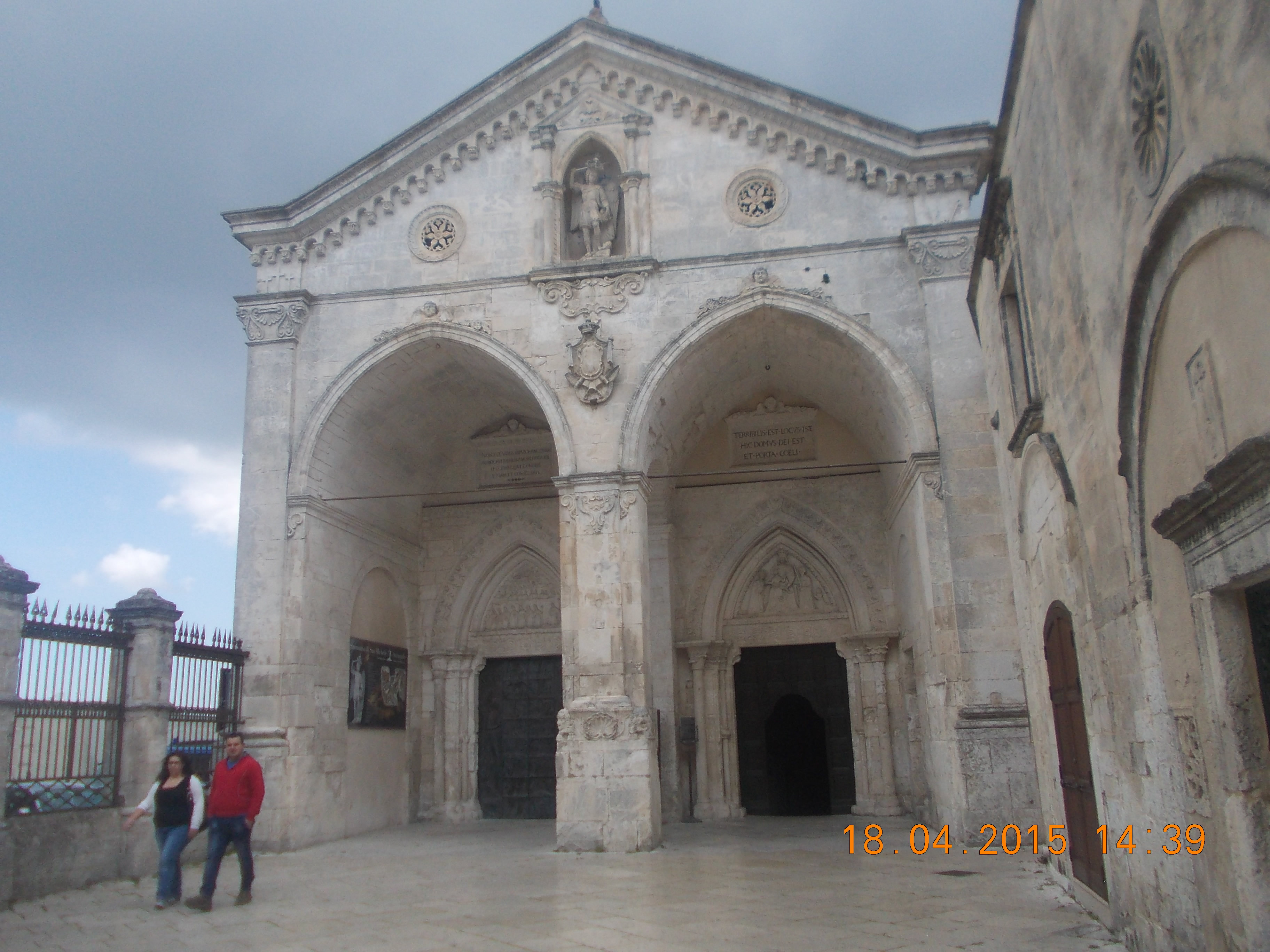 Sanktuarium św. Michała Archanioła w Monte San'tAngelo